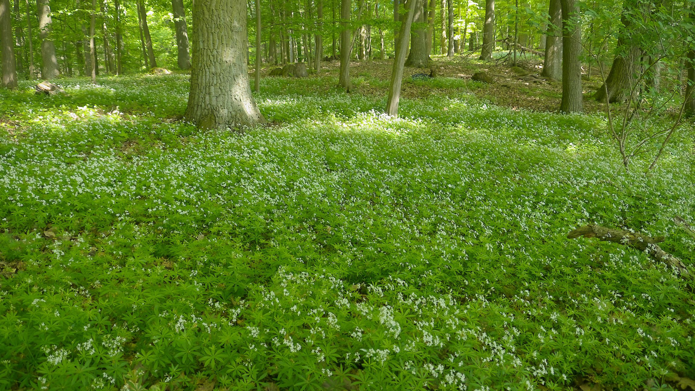 Großflächiges Waldmeistervorkommen am Großen Plunzsee im Buchenwald Grumsin